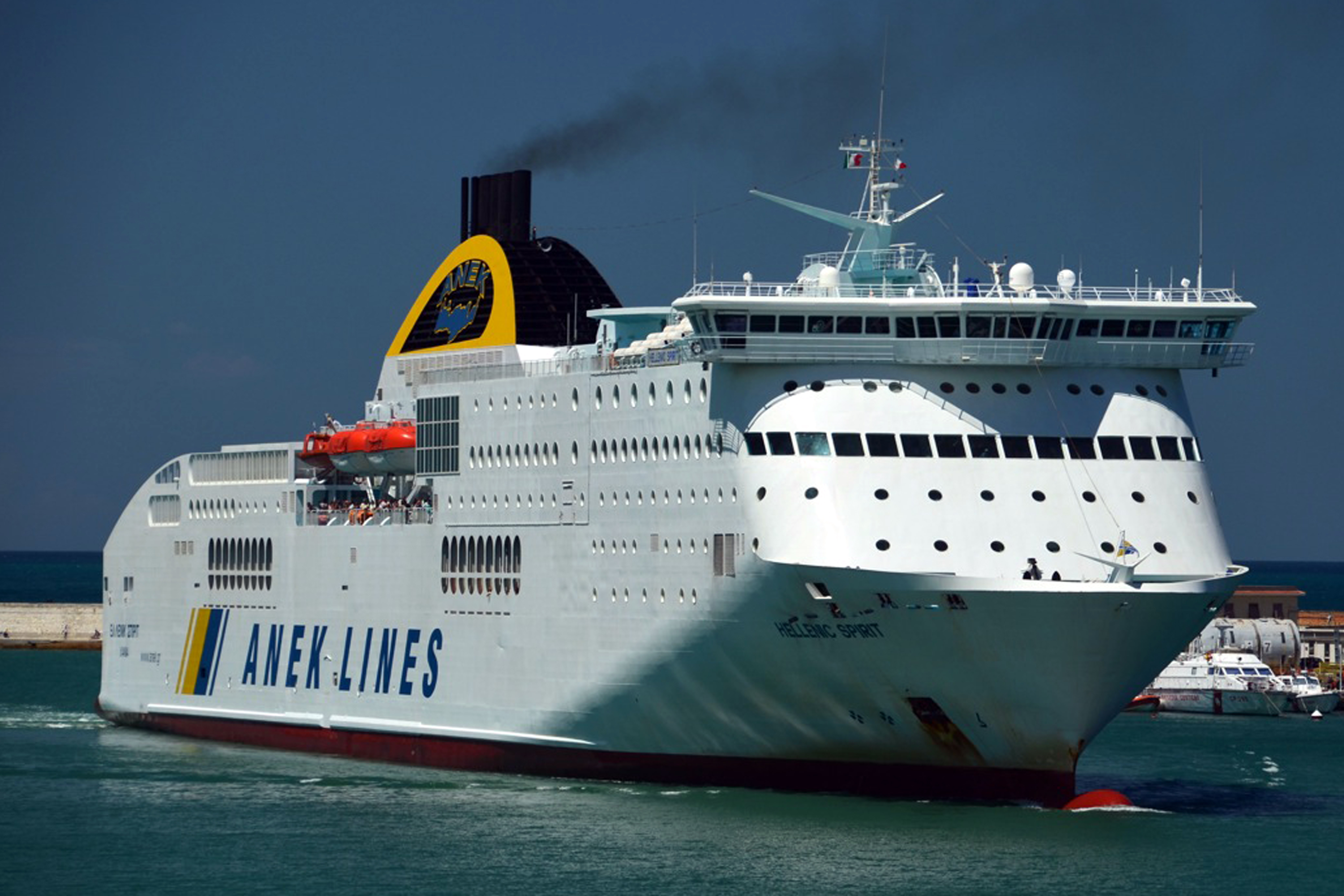 Le ferry Hellenic Spirit de la compagnie ANEK Lines à son arrivée à Ancône (Italie) en provenance de Patras (Grèce) durant l'été 2011.